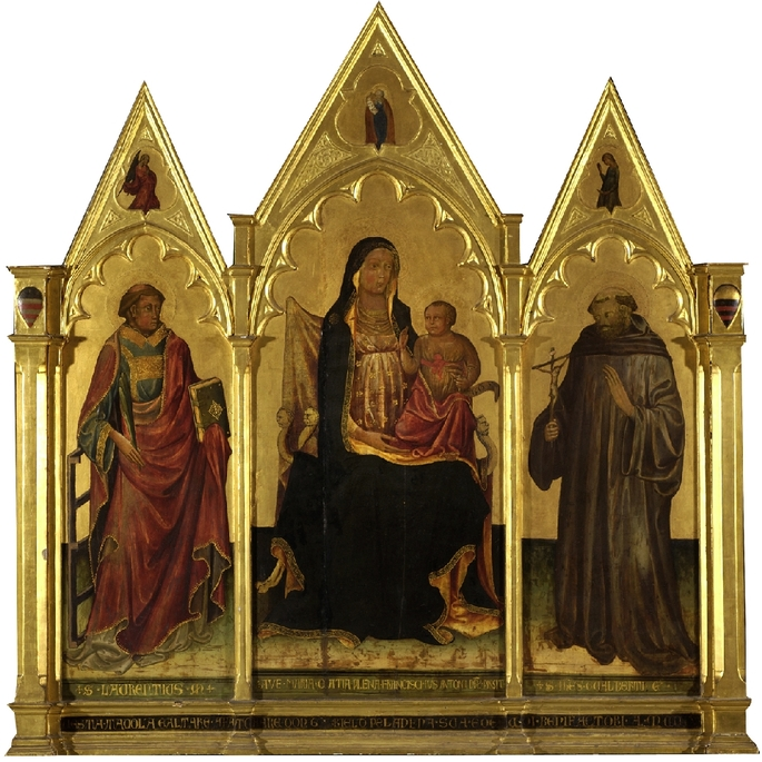 trittico